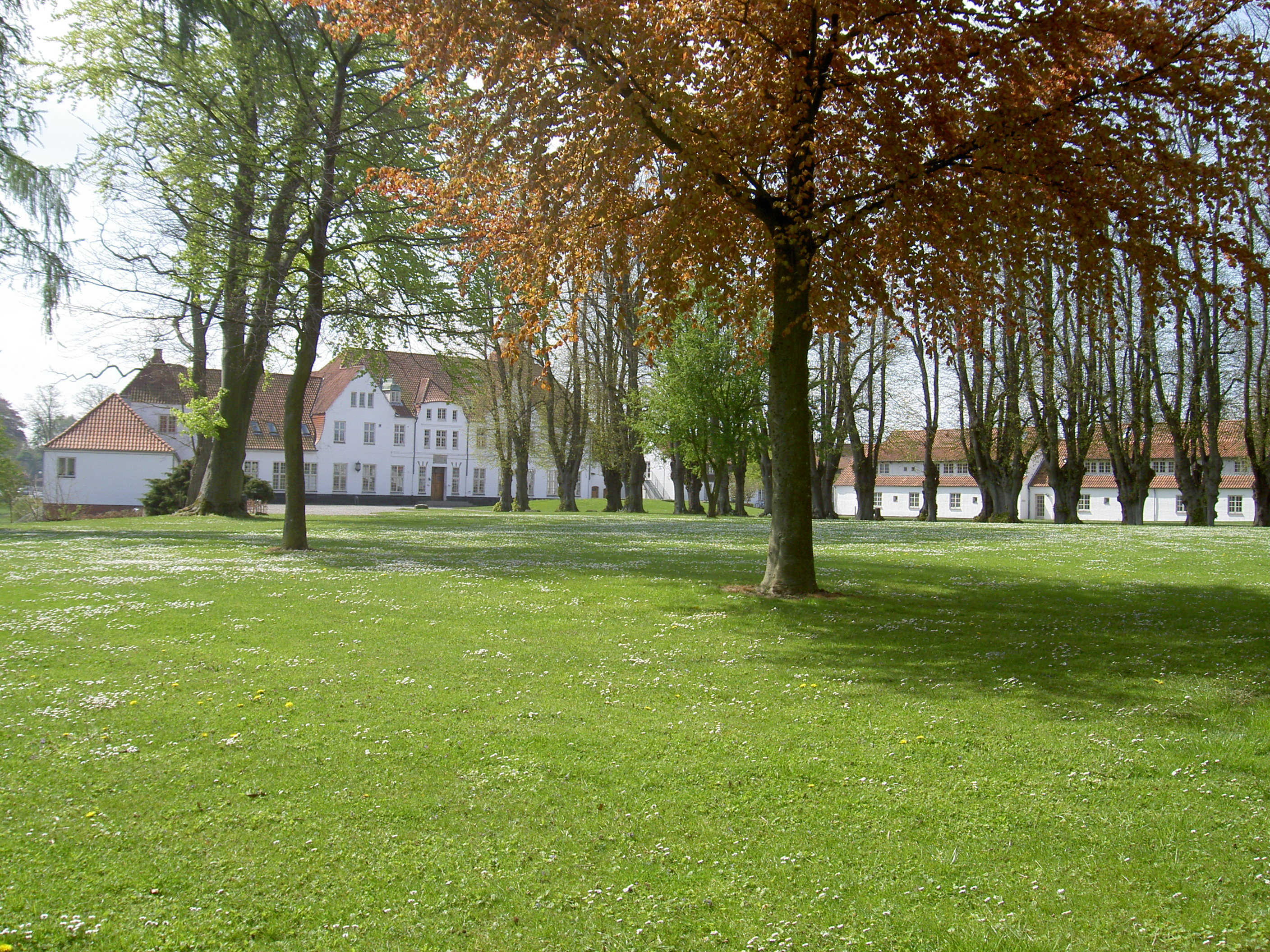 Schloss Nordborg Parkanlage